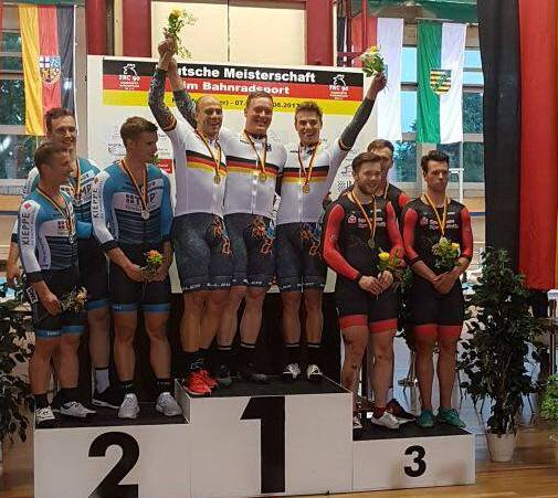 Podium Teamsprint, v.l.n.r.: René Enders, Marc Jurczyk, Jan May, Maximilian Levy, Erik Balzer, Maximilian Dörnbach, Moritz Meißner, Nik Schröter, Eric Engler